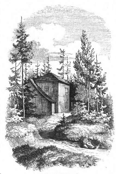 Goethe’s Haus.